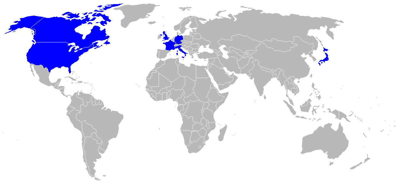 El Primer mundo